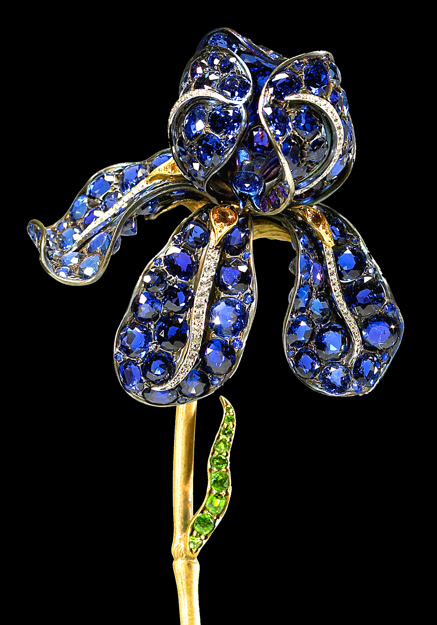 see source image for considerable detail